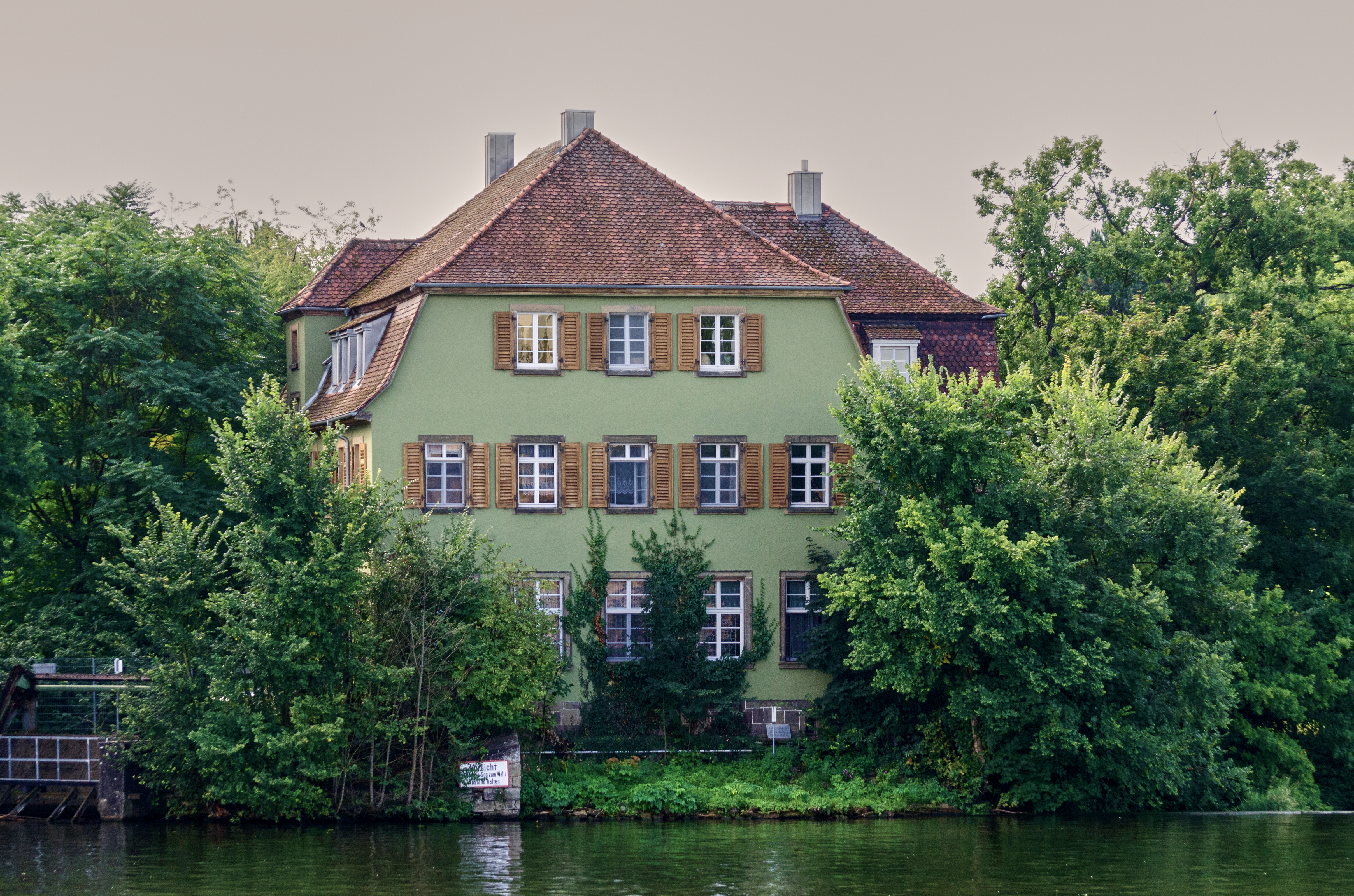 Schweinfurt, Grünes Haus